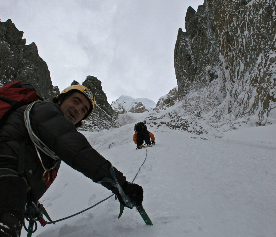 Giovanni Ongaro lungo la via nuova al San Lorenzo